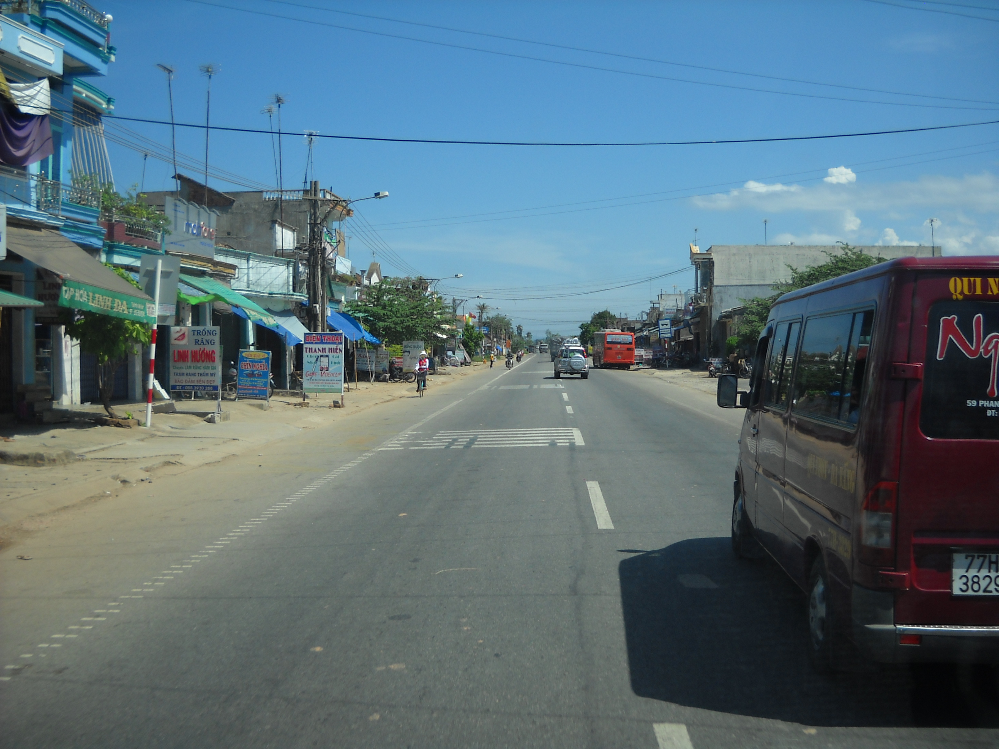 Thị trấn Mộ Đức